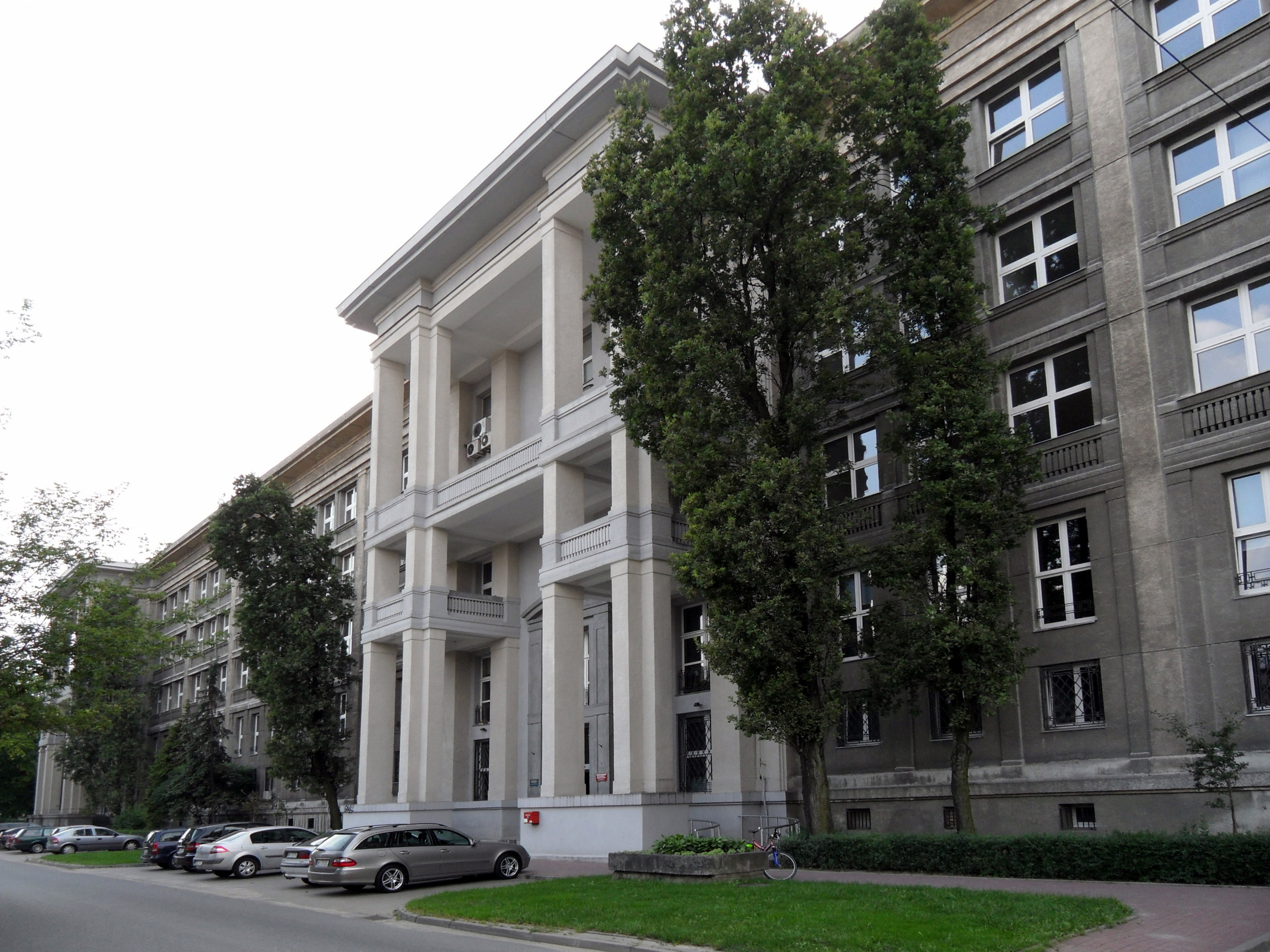 Wydział MIM UW przy ul. Pasteura w Warszawie